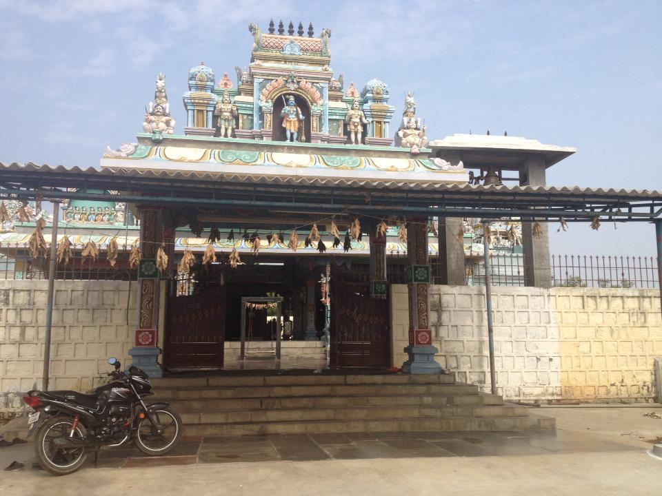 ஊமைக்கருமியண்ணன் ஆலய முகப்பு தோற்றம்